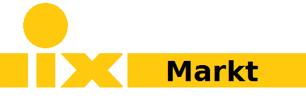 Zeichen der IX-Märkte